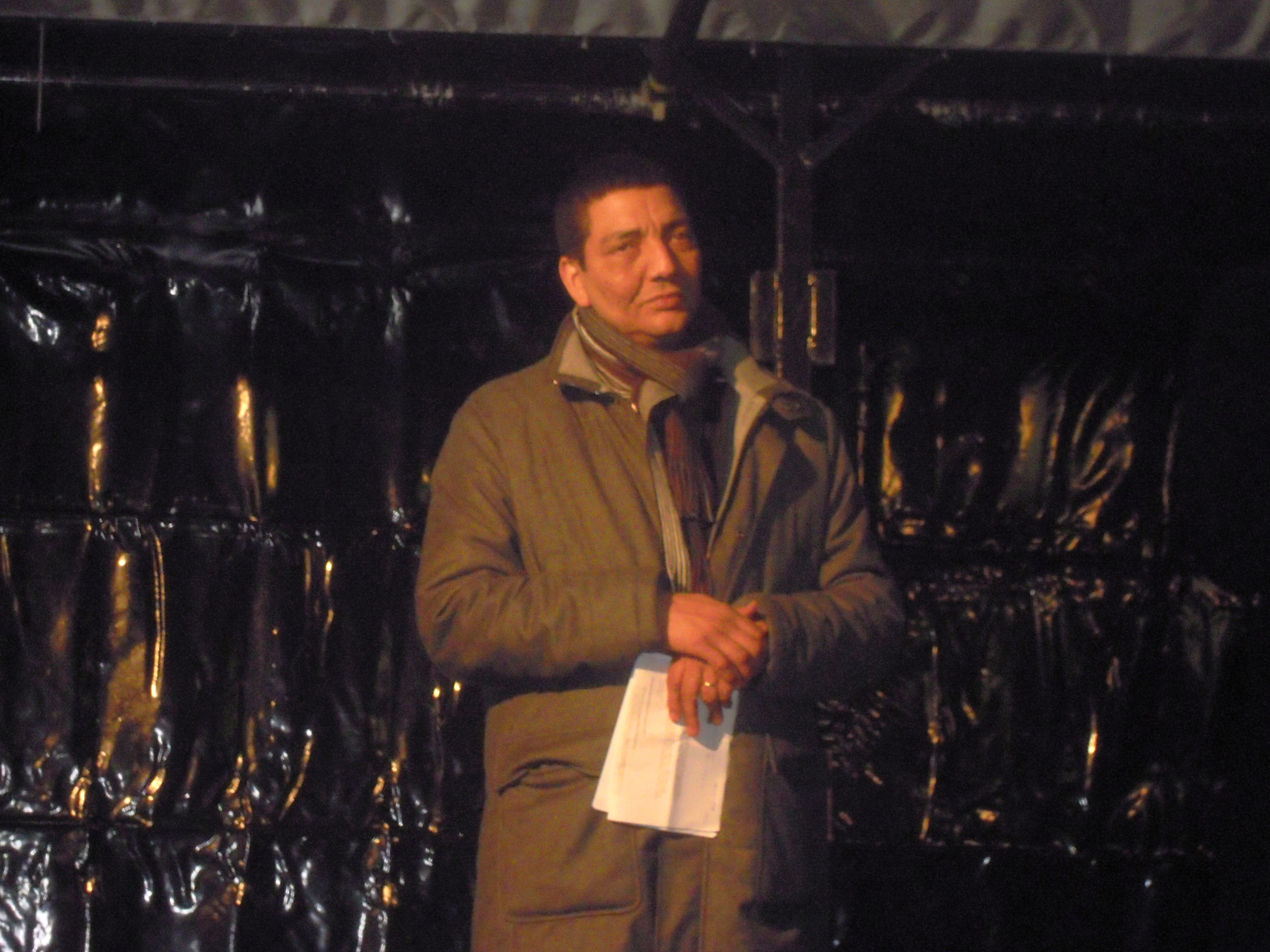 Jörgen Raymann bij de opening van het Bigshops Parkboulevard winkelcentrum in Rotterdam Delfshaven.